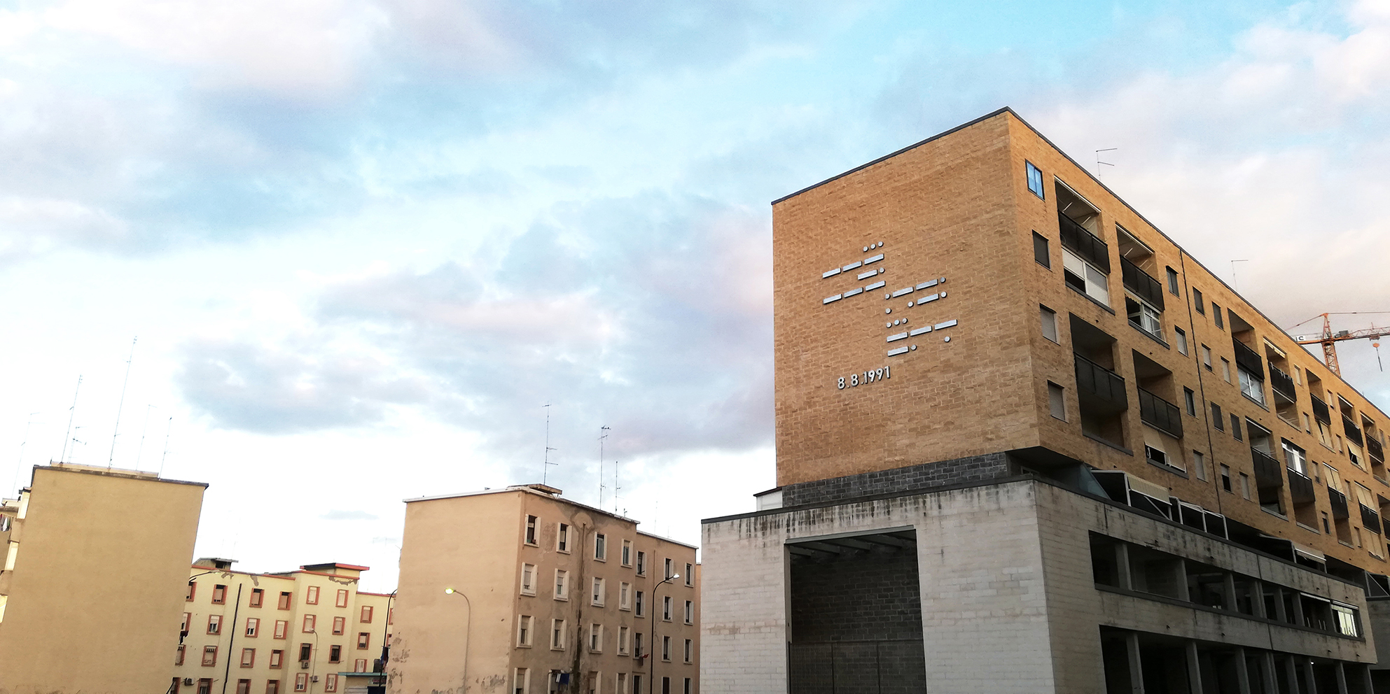 La scultura pubblica "Sono Persone 8.8.1991" di Jasmine Pignatelli dedicata al sindaco Enrico Dalfino e allo sbarco della nave Vlora. Acciaio inox e morse code.